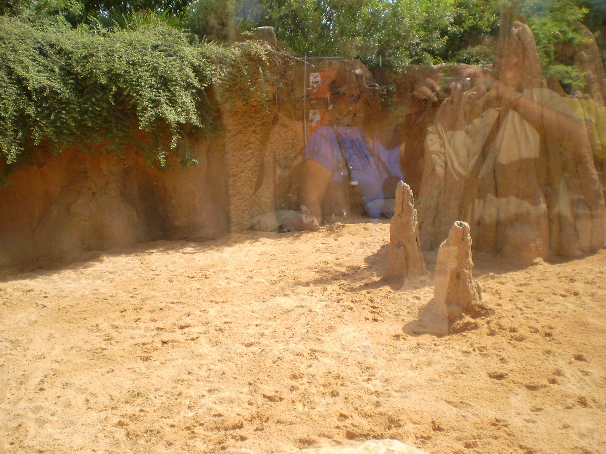 Facoquero comun